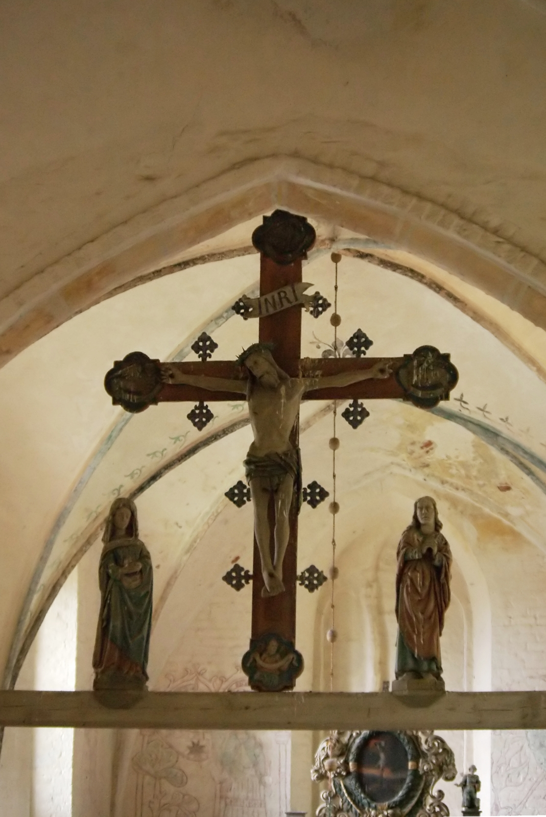 Kirche in Gustow, Rügen, Triumpfkreuzgruppe